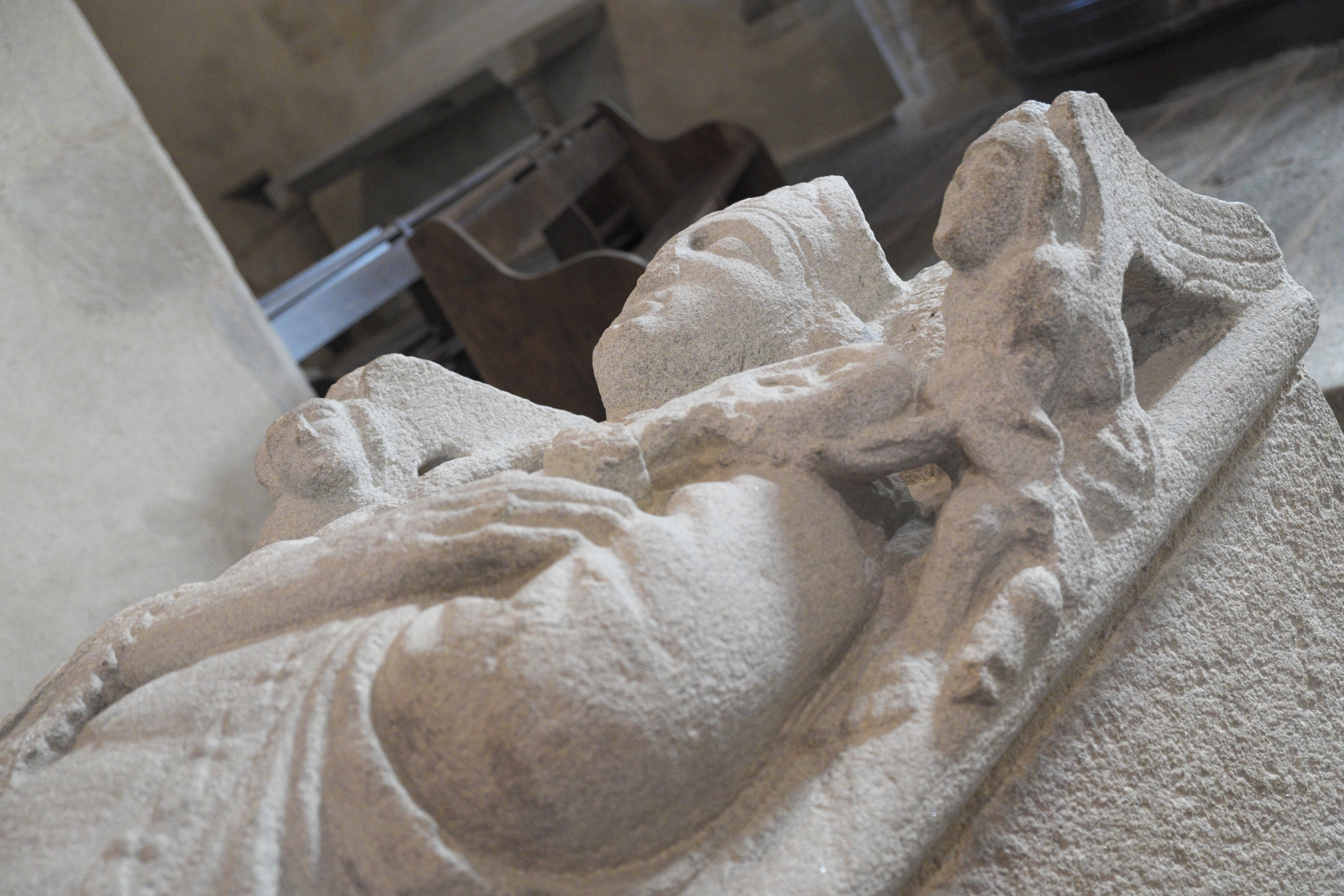 Alte Katholische Pfarrkirche Saint-Lunaire in Saint-Lunaire im Département Ille-et-Vilaine (Region Bretagne/Frankreich), Grab des heiligen Lunaire